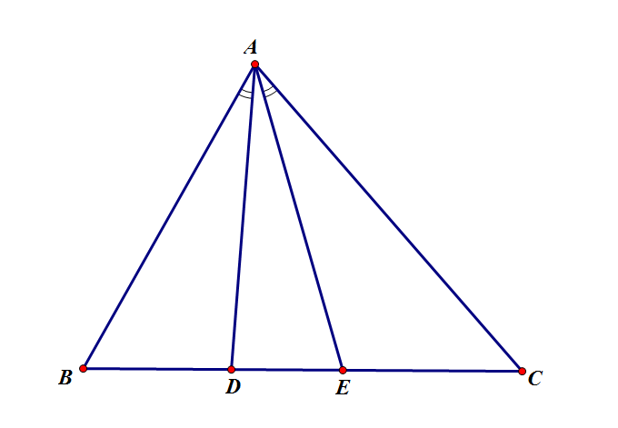 等角共轭线